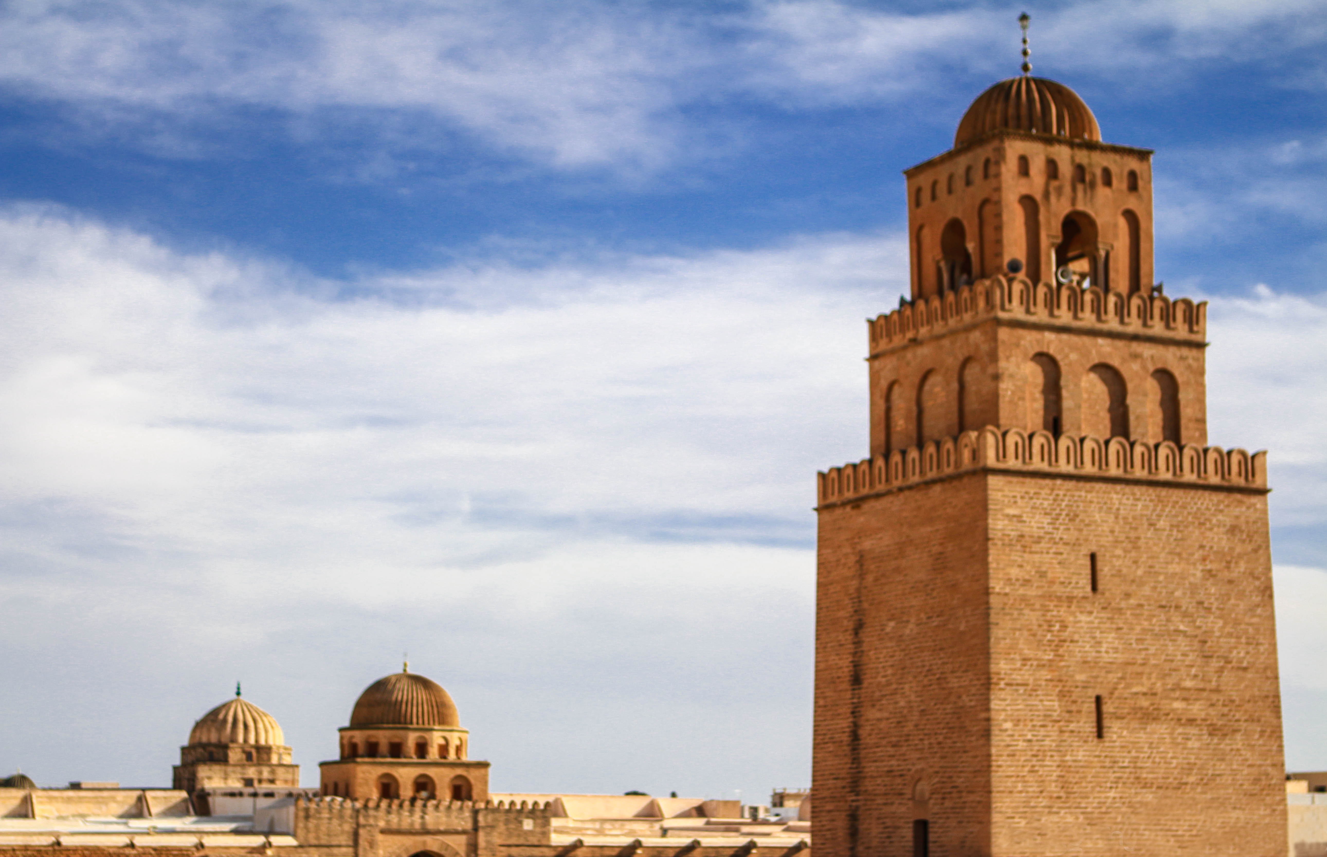 Grande Mosquée (Sidi Okba), Kairouan